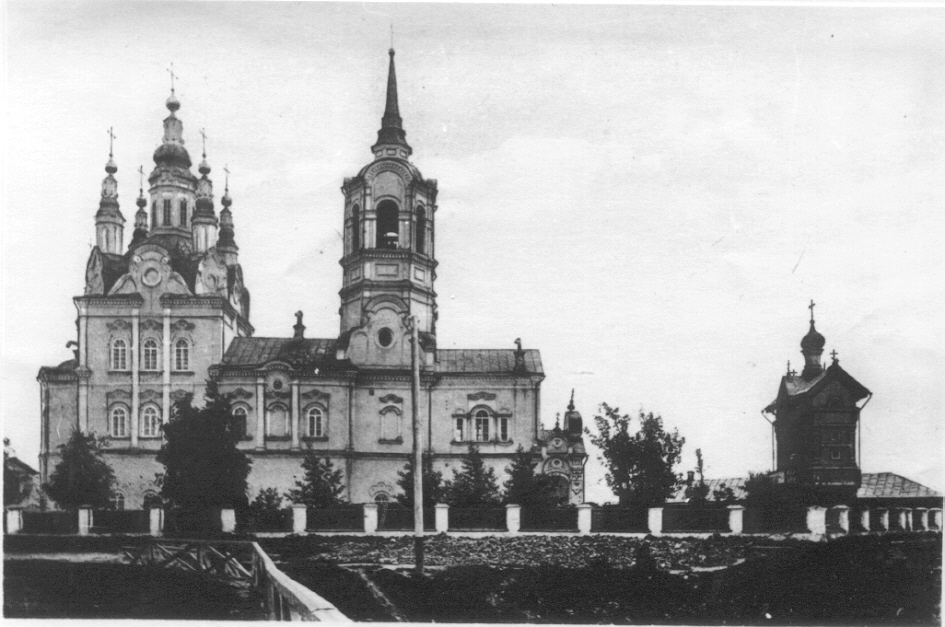 Воскресенская церковь в Томске, фото начала XX века; с сайта